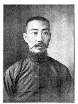 中文（台灣）: 中華民國國會議員